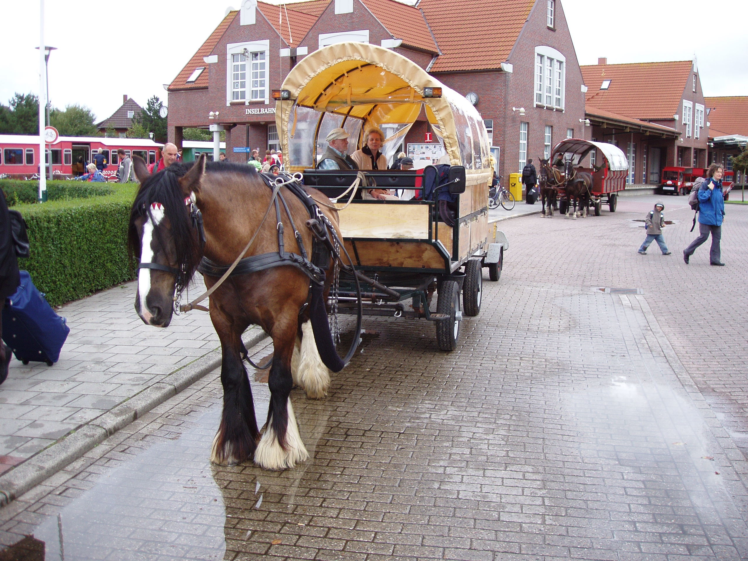 Taxi auf der autofreien Insel Langeoog im August 2006